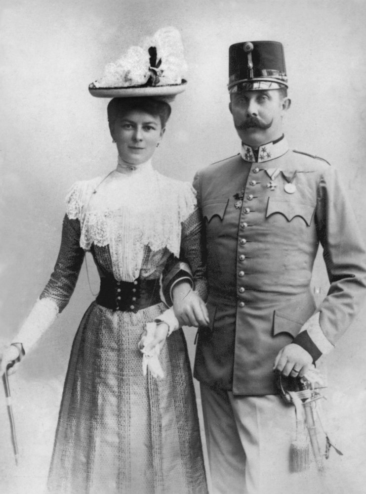 Zofia von Hohenberg i jej mąż arcyksiążę Franciszek Ferdynand Habsburg.